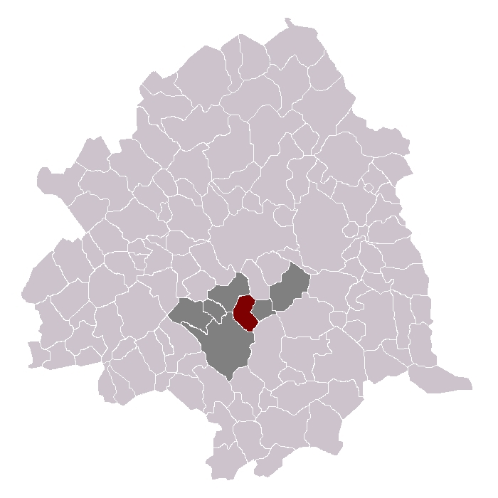 Templemars dans son canton et son arrondissement